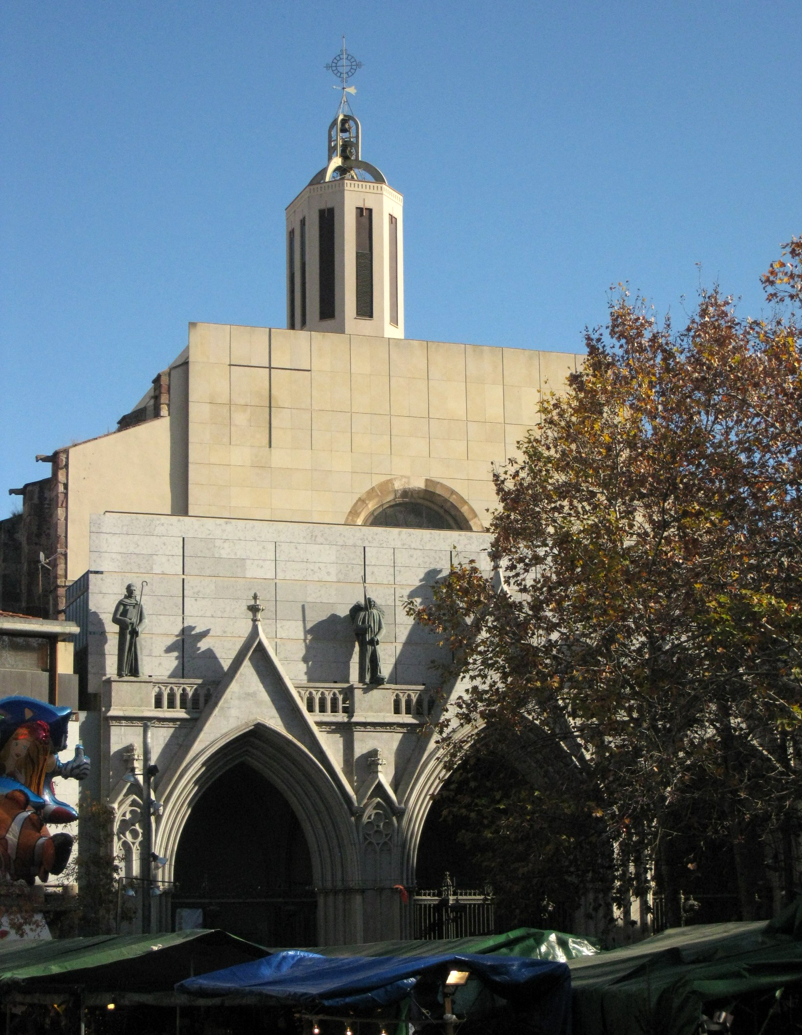 Catedral del Sant Esperit (Terrassa), Fira de Santa Llúcia a la plaça Vella